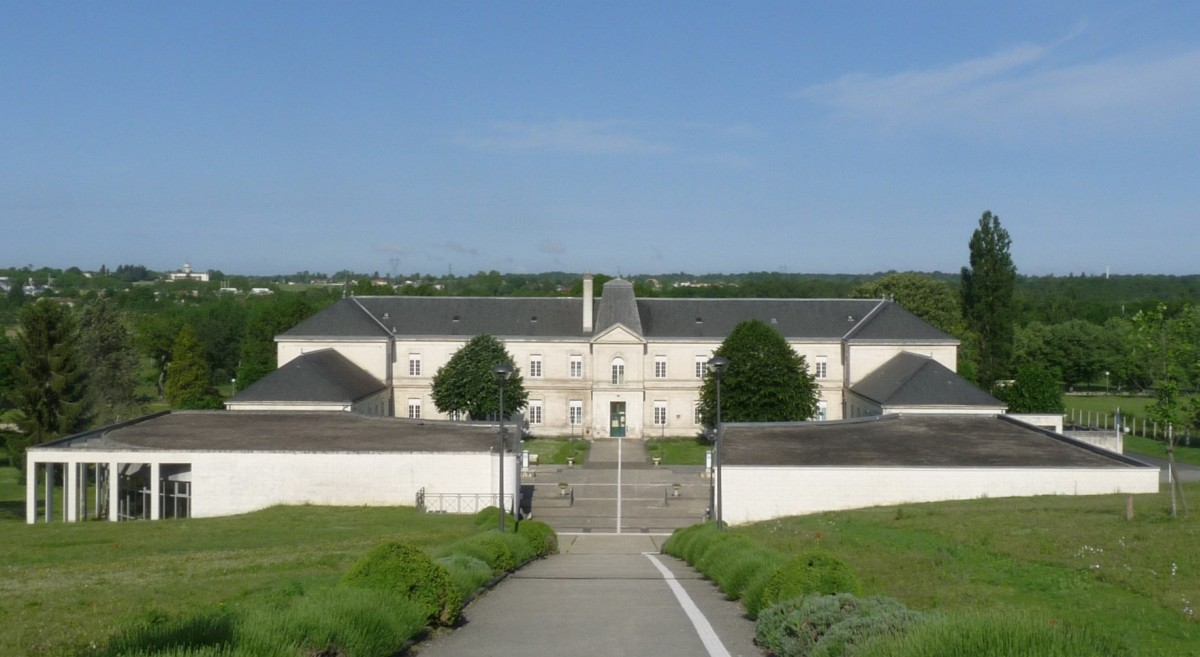 Université d'Angoulême, Breuty, La Couronne, Charente France